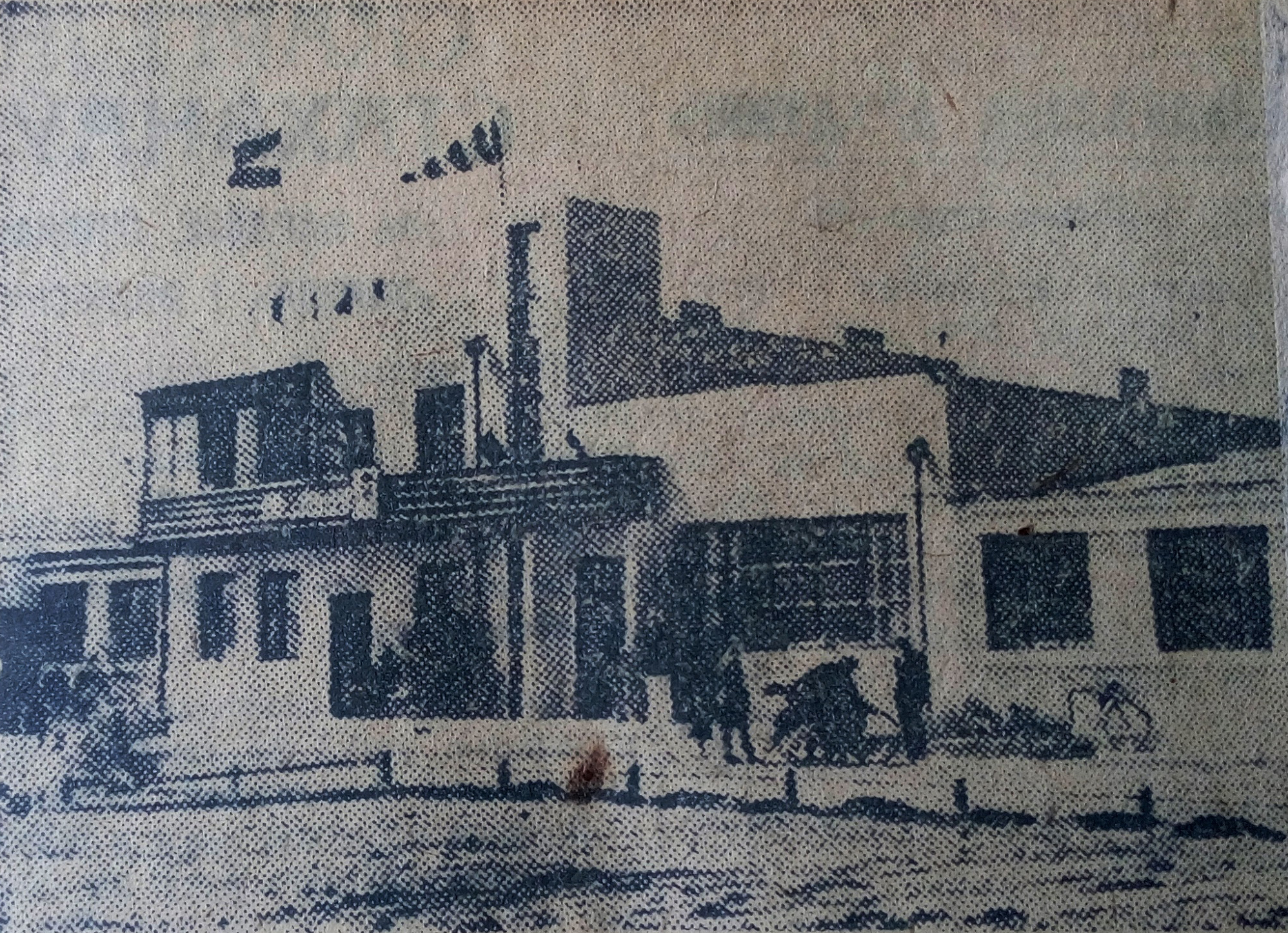 Беларуская (тарашкевіца): Менск (Miensk), Сенажаны (Sienažany). Аэрапорт